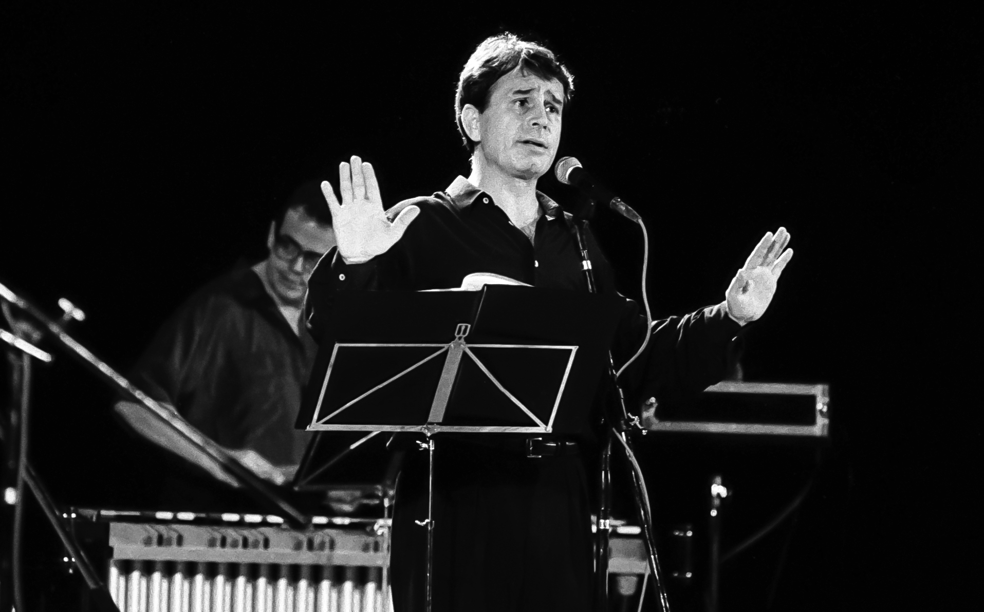 Actuación en Alcoi de Ovidi Montllor